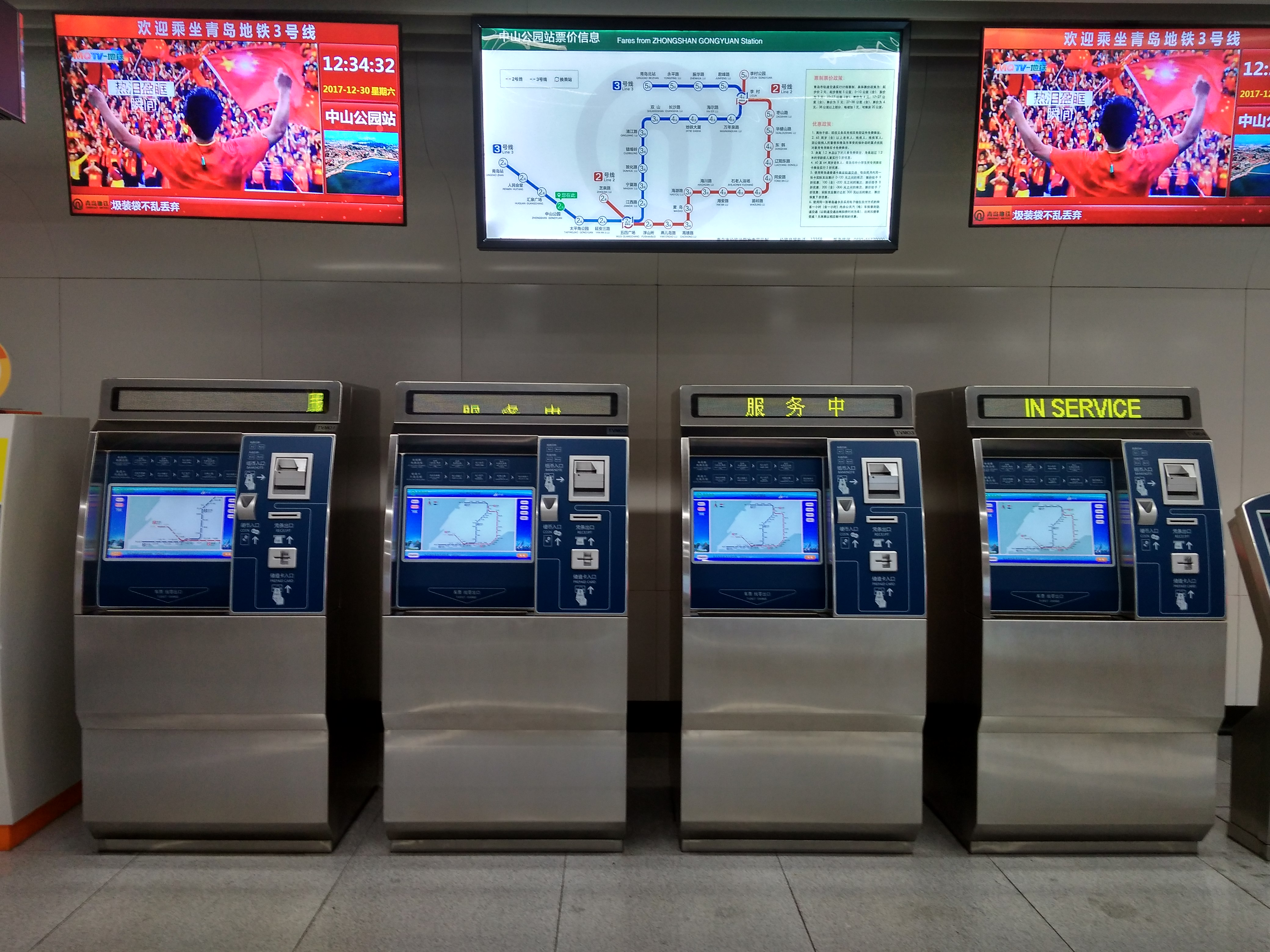 中文（中国大陆）: 青岛地铁自动售票机，摄于青岛地铁3号线中山公园站。